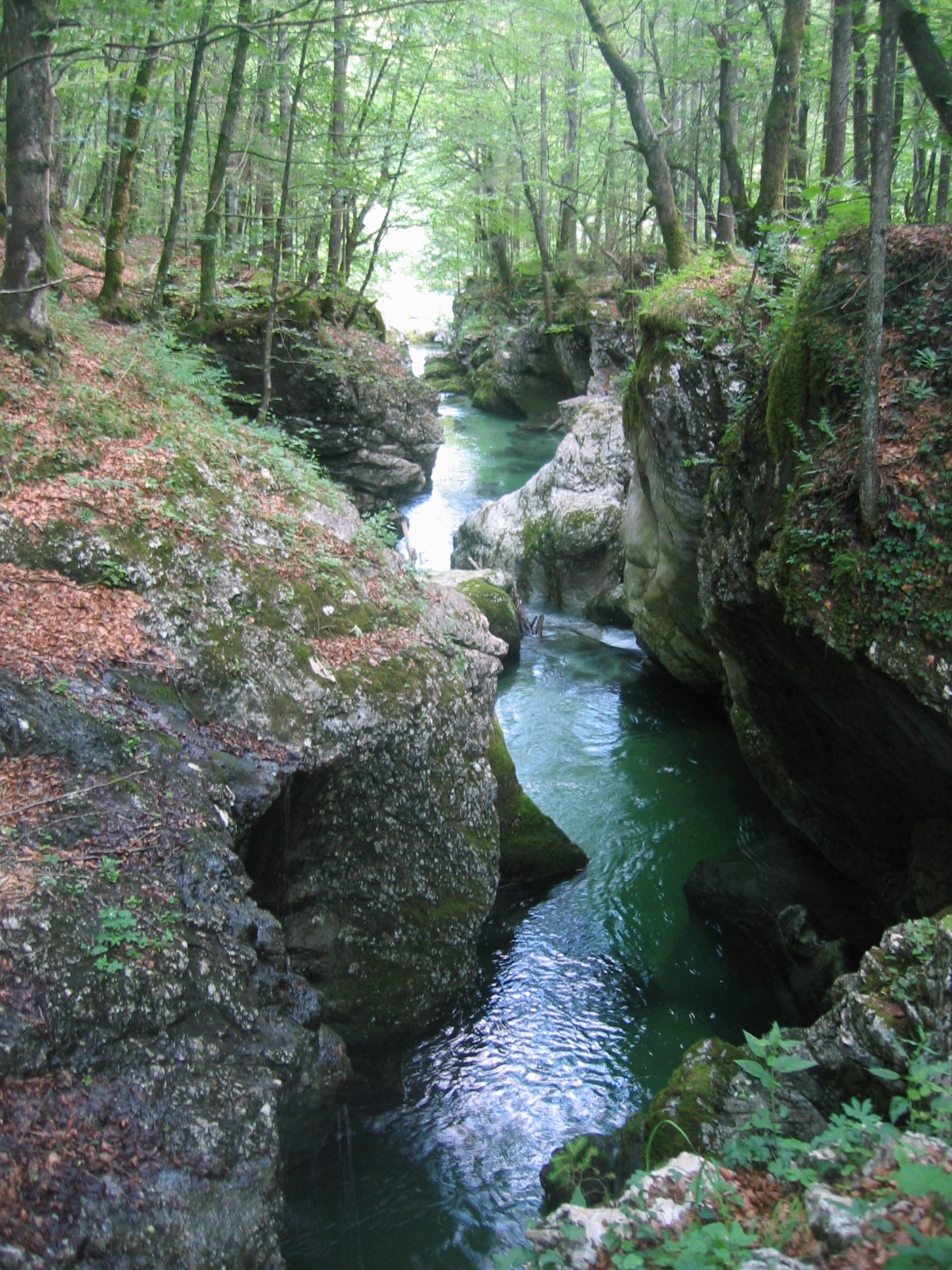 Mostnica, alpine river (stream) in Slovenia, near Bohinj lake.